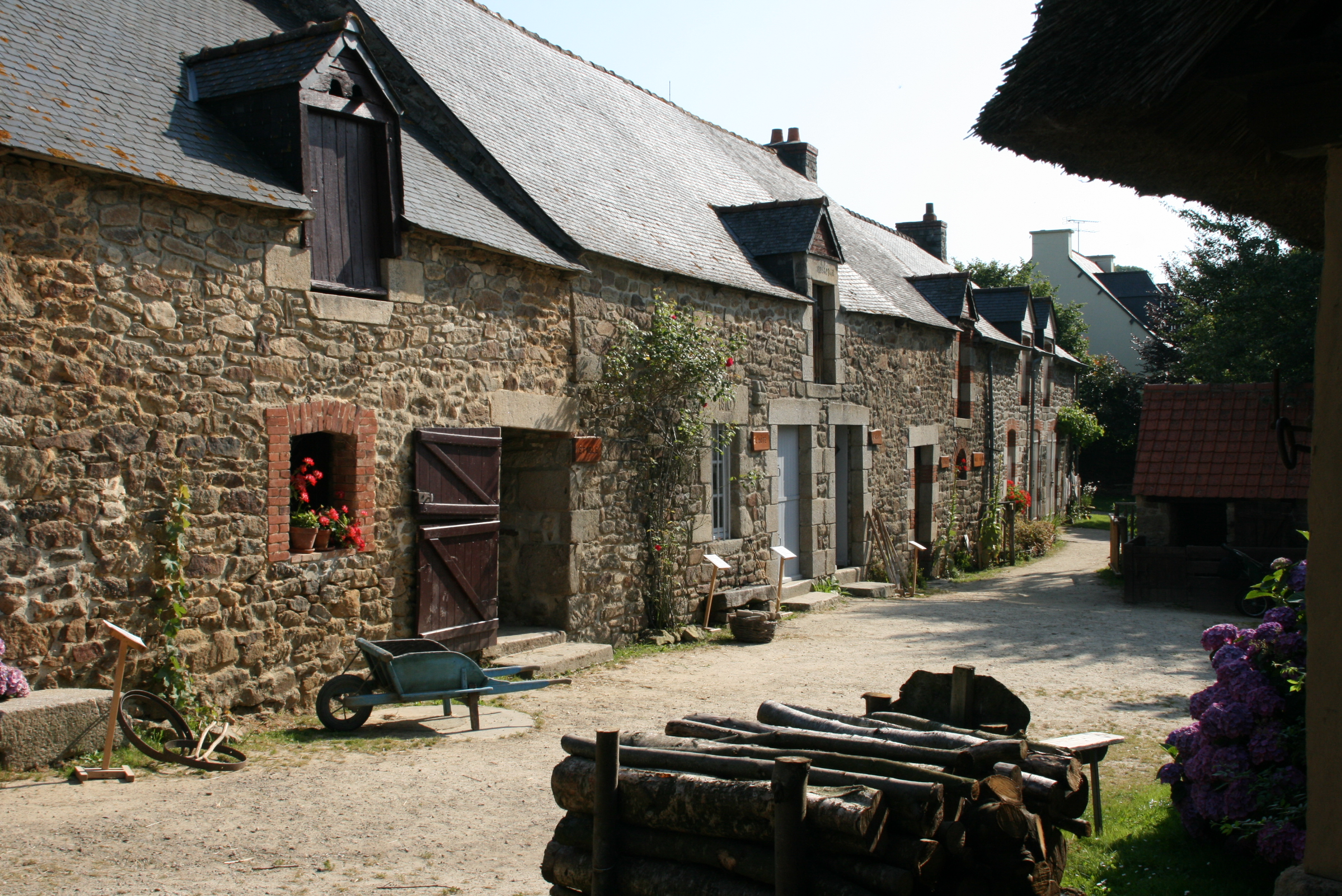 La Ferme d'Antan à Plédeliac